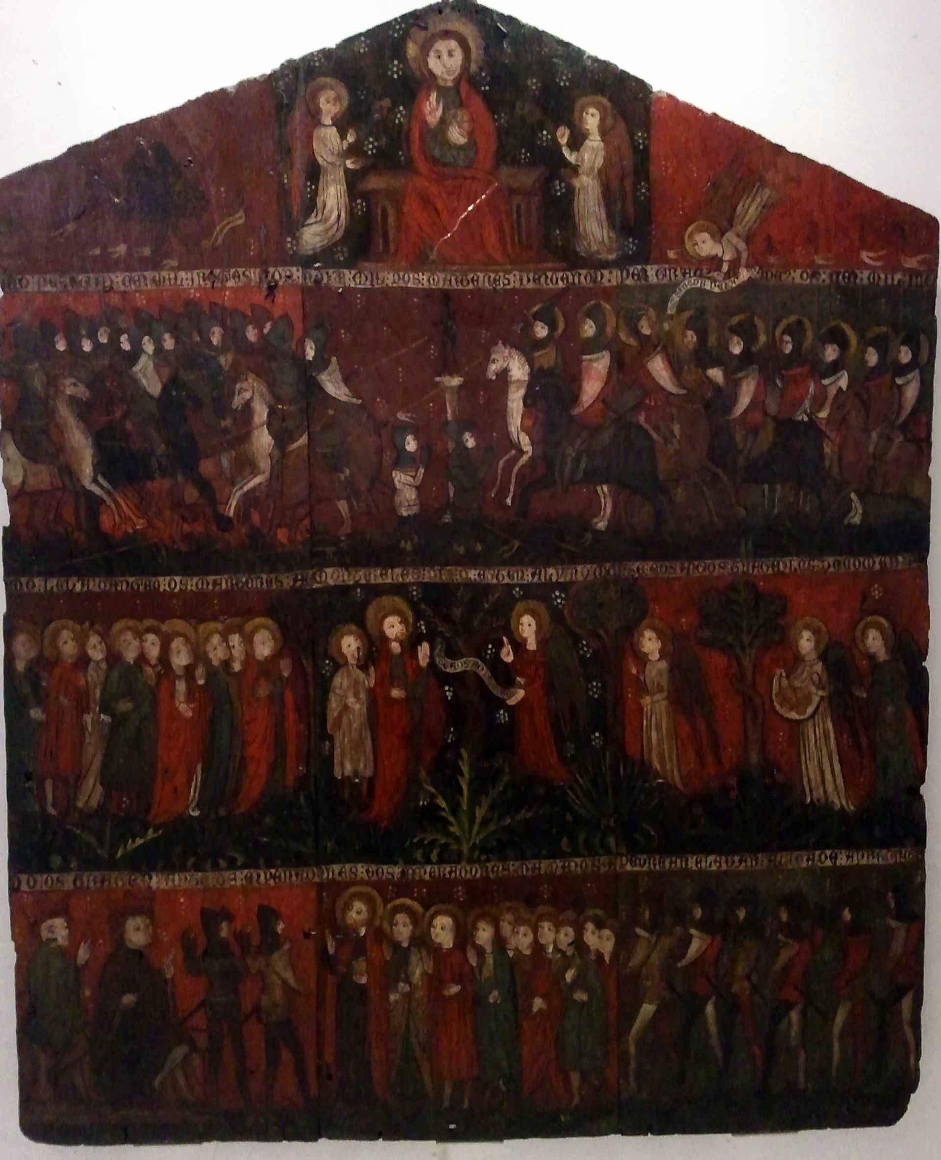 Retablo de Belvís (c. 1390)